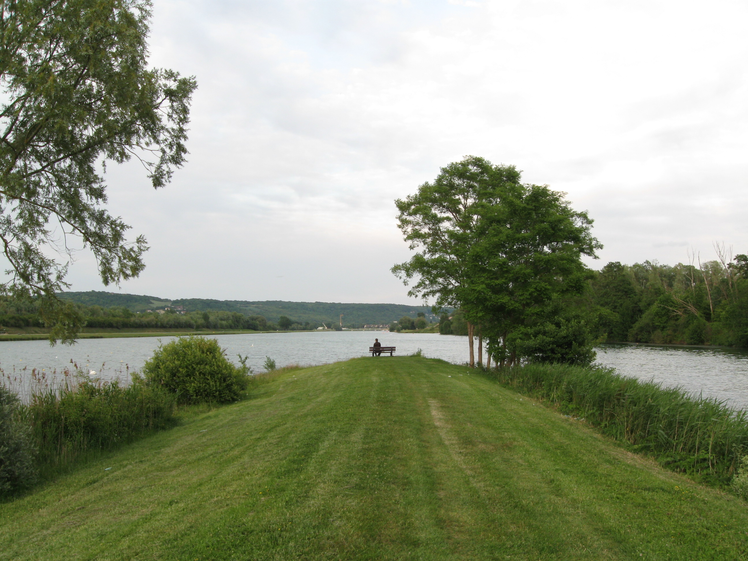 Ceinture verte de l'agglomération mantaise, au niveau du stade nautique international à Mantes-la-Jolie